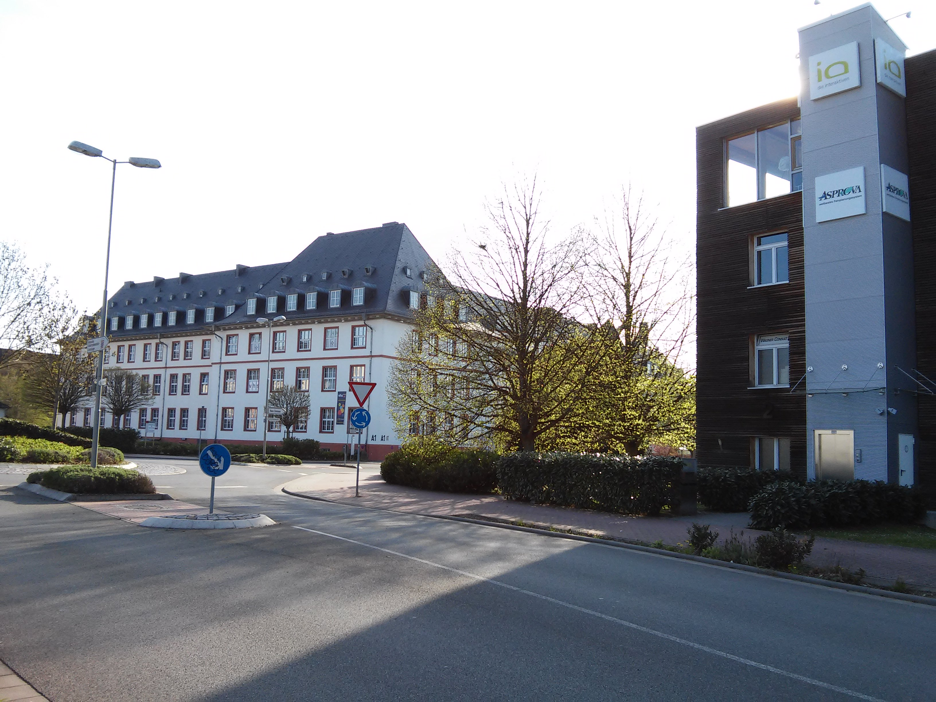 THM Campus Wetzlar, ehemalige Spilburg-Kaserne